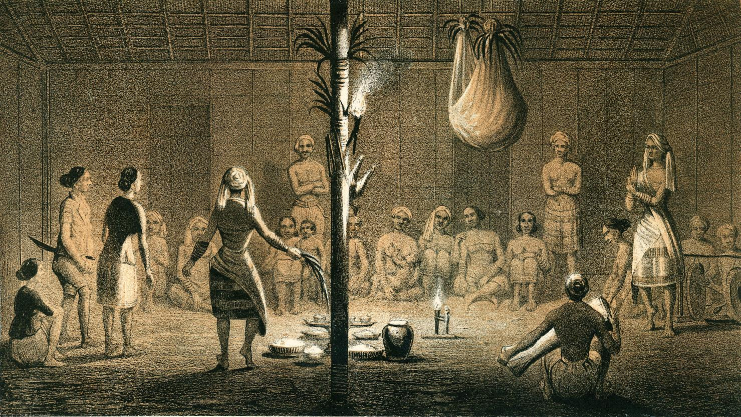 C.A.L.M. Schwaner, Borneo. Ein Bilianfest der Dayak von Sungi Pattaym